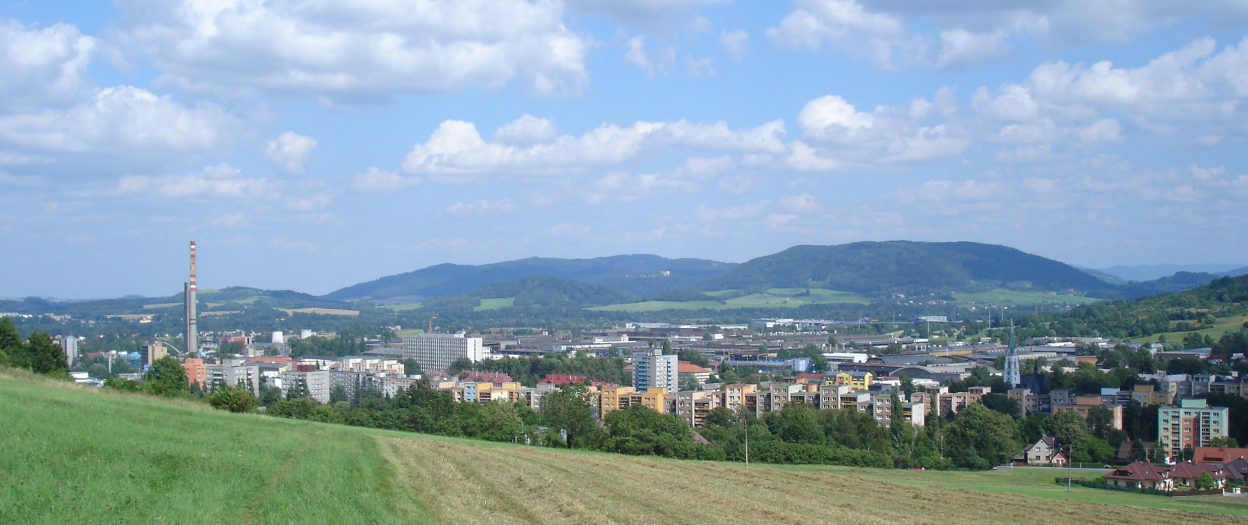 Město Kopřivice ze svahu Bílé Hory. V pozadí Podbeskydská pahorkatina s hradem Hukvaldy uprostřed. V zadní části města leží rozlehlá automobilka Tatra.